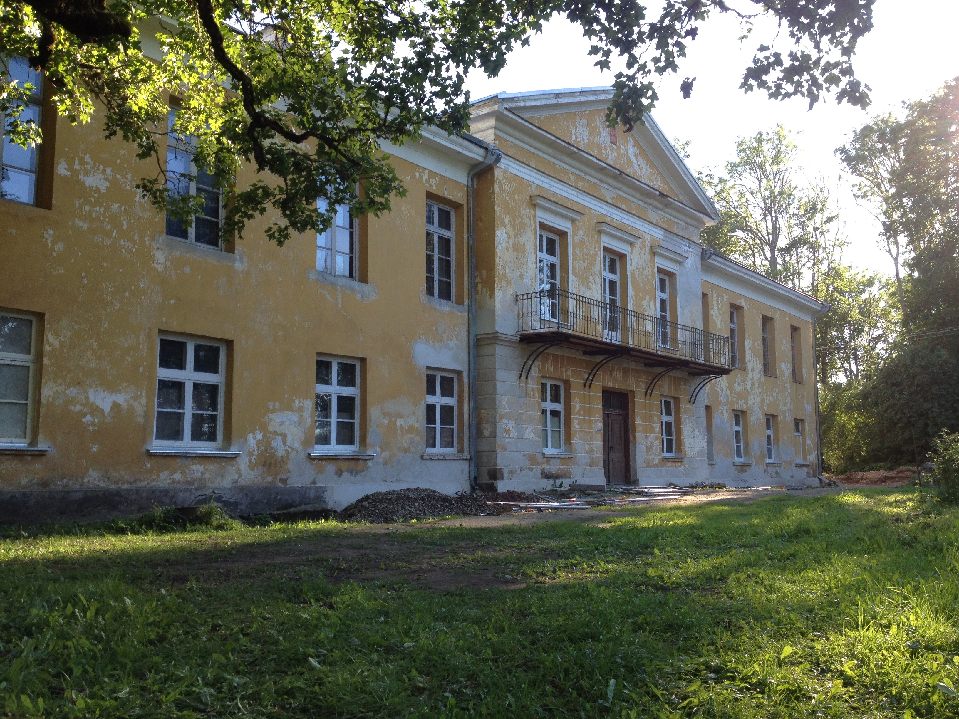 Vaimõisa mõis